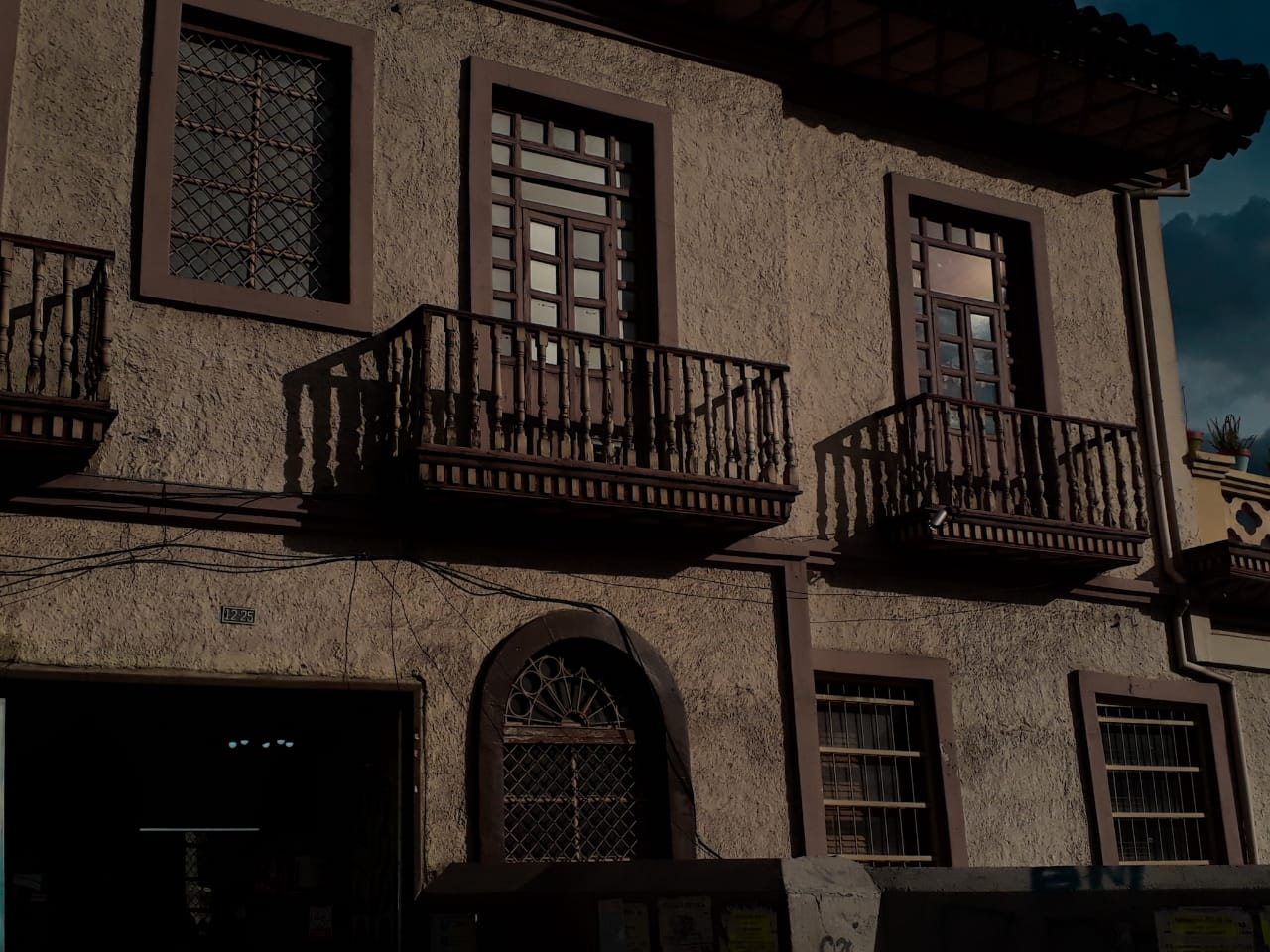 Edificación Centro Hisotrico